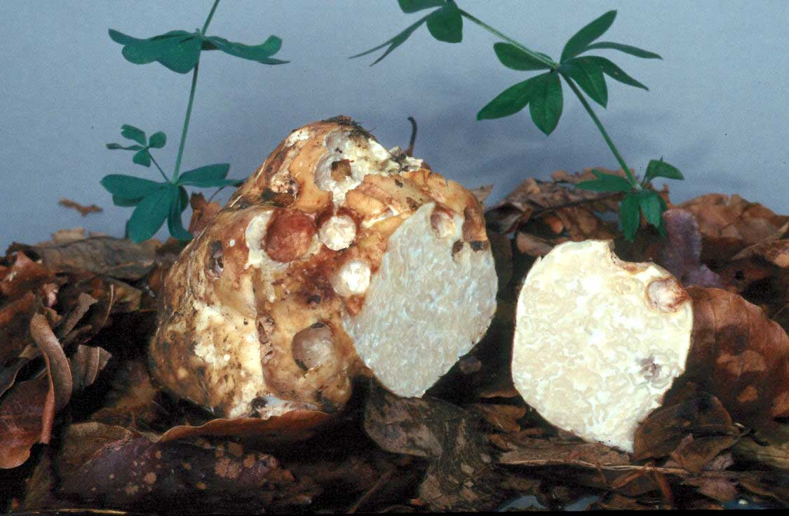 (Stachelsporige) Mäandertrüffel, Choiromyces maeandriformis